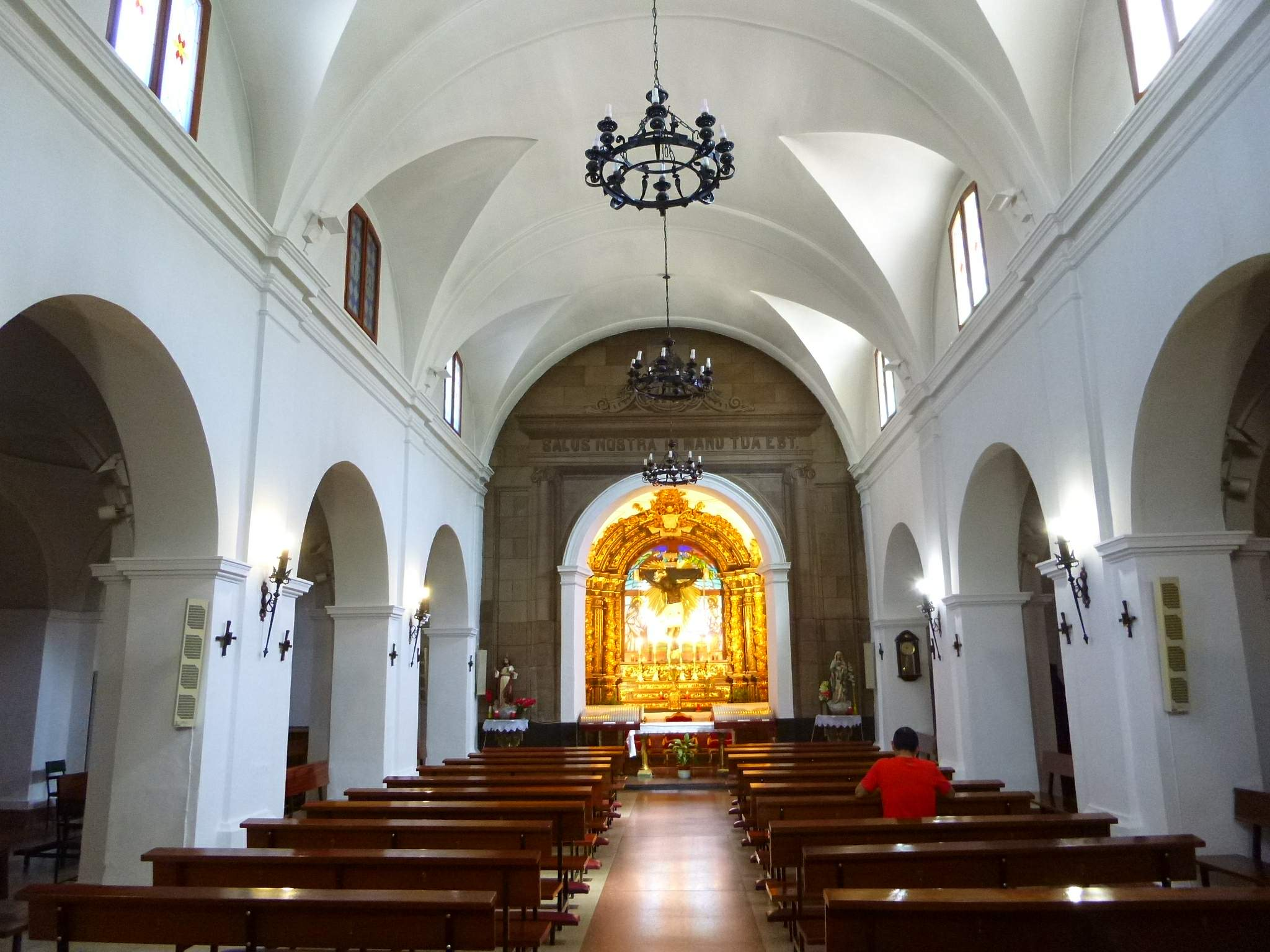 Valdemoro - Ermita del Santísimo Cristo de la Salu